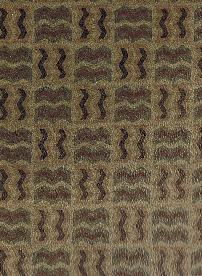 Linoleumentwurf von Heinz Stoffregen